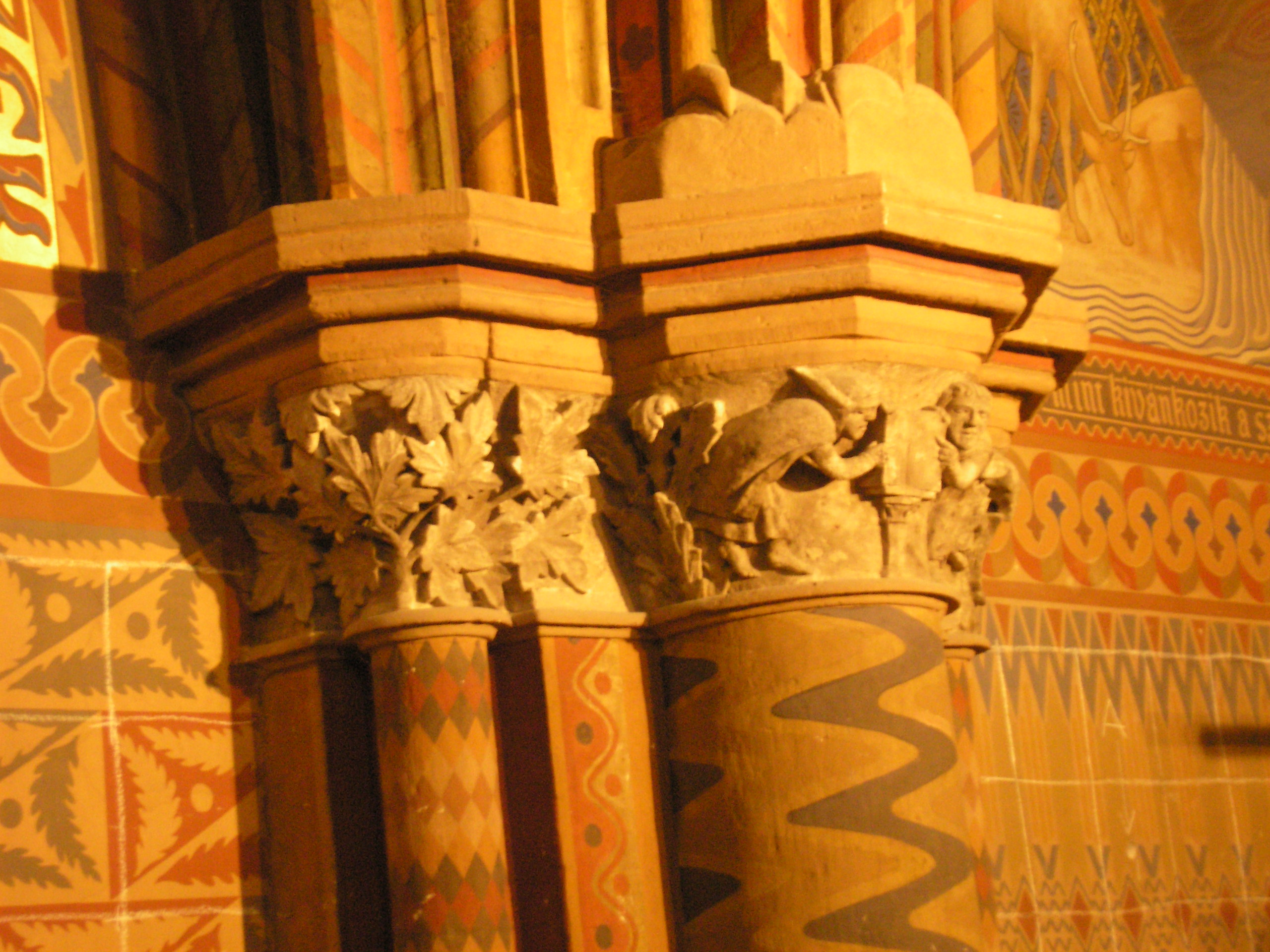 Kapitell in der Matthiaskirche, Budapest, Ungarn.